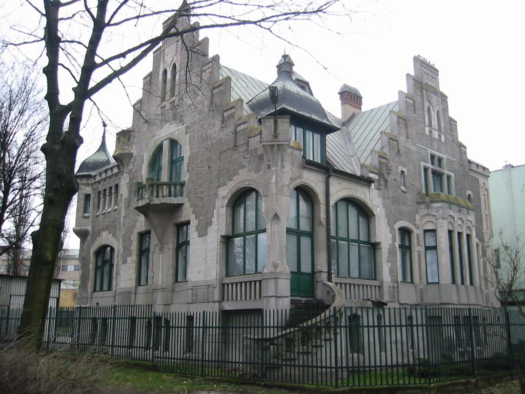 Willa Hüffera w Łodzi